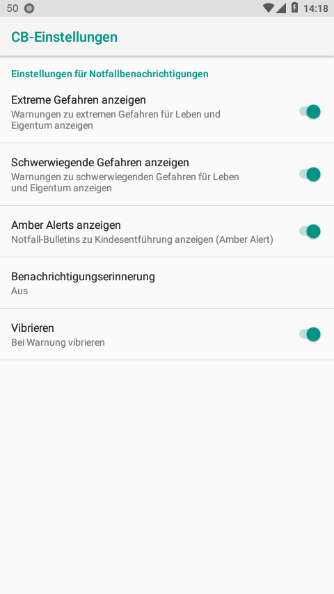 Android 8 Cell Broadcast Notfallbenachrichtigungen. Aufgenommen aus einer Android 8 Emulation die in Österreich lokalisiert ist.